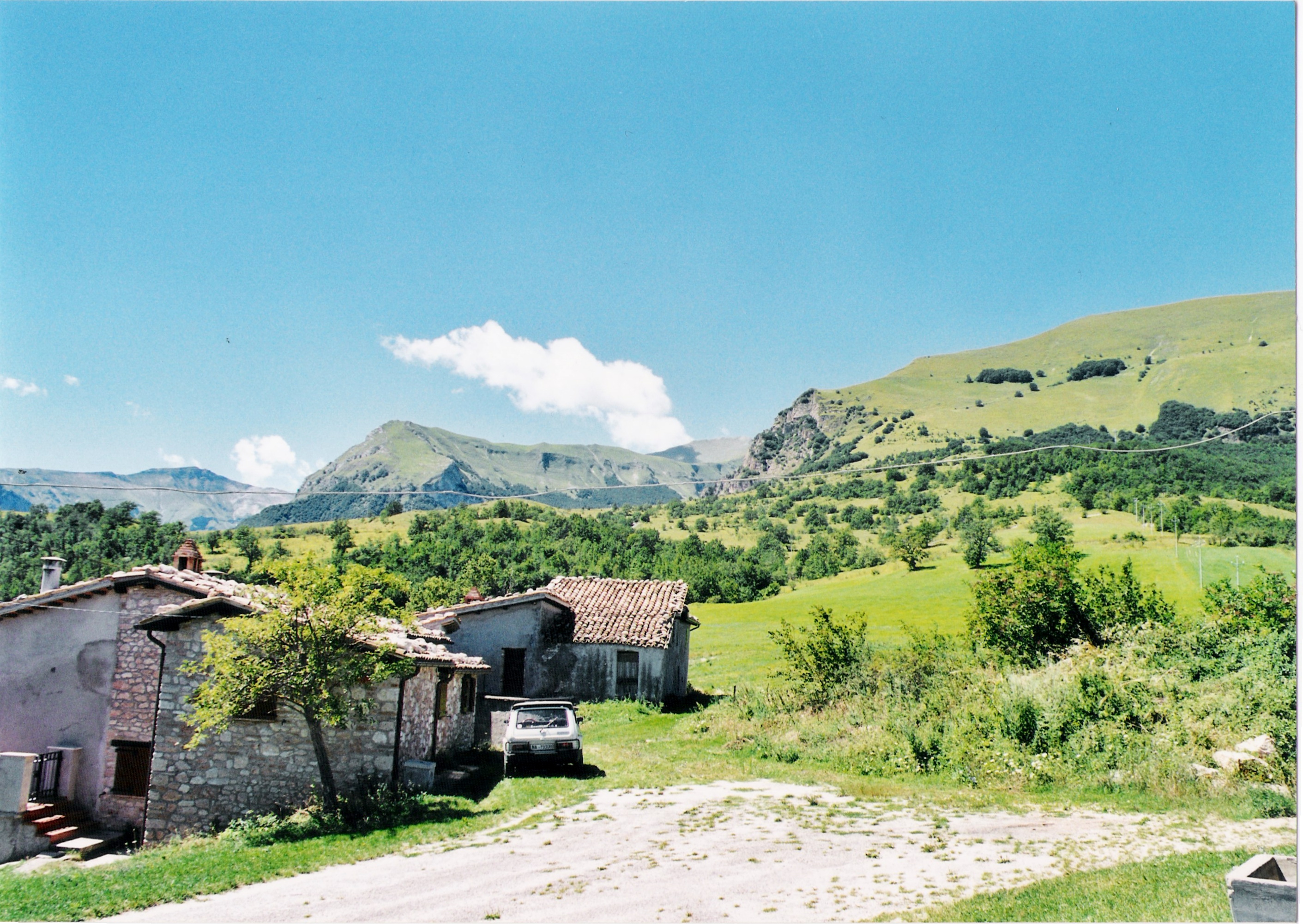 Casalicchio, Amandola (FM) e i monti Sibillini